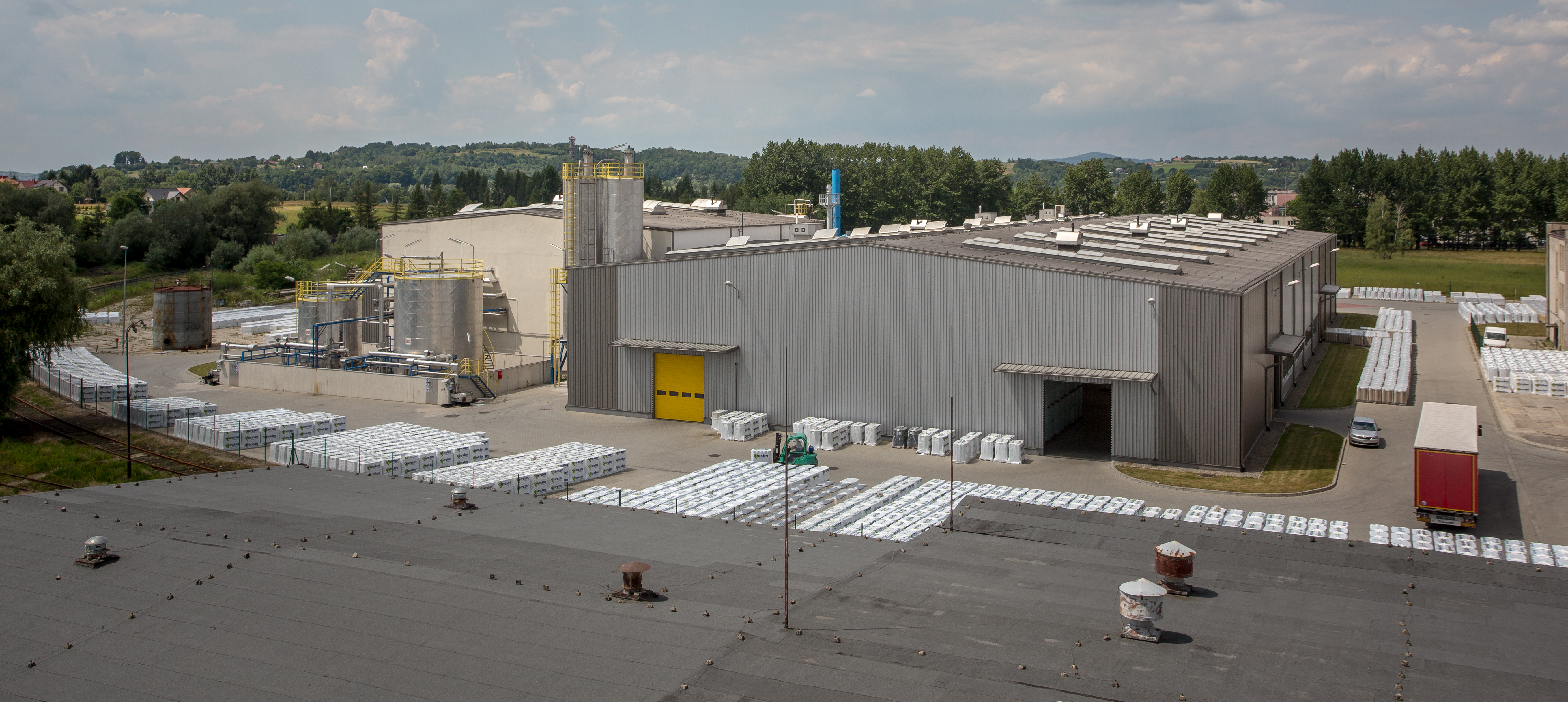 Fabryka należąca do Izohanu w Jaśle